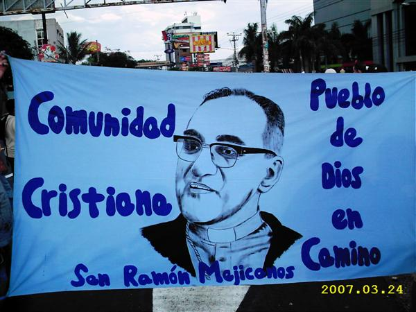 Foto tomada durante el acto de conmemoración del 27º aniversario del martirio de Monseñor Oscar A. Romero en San Salvador, El Salvador